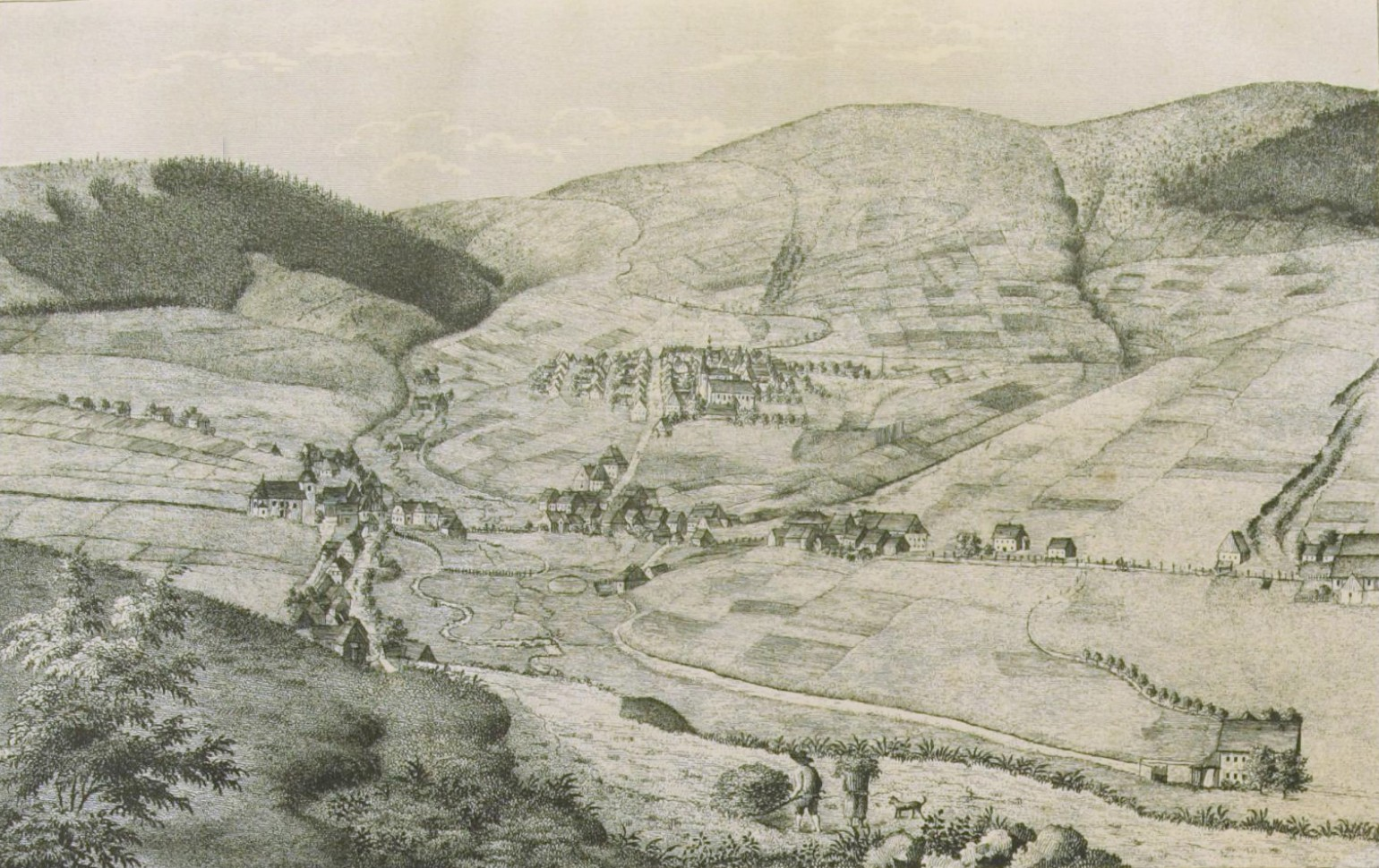 Johann Traugott Lindner: Wanderungen durch die interessantesten Gegenden des Sächsischen Obererzgebirges. Ein Beitrag zur specielleren Kenntniß desselben, seines Volkslebens, der Gewerbsarten, Sitten- und Gebräuche. Mit 12 Lithographien, Verlag Rudolph und Dieterici, Annaberg 1848 Digitalisat von Band 3 in der Staats- und Universitätsbibliothek Dresden Wiesenthal